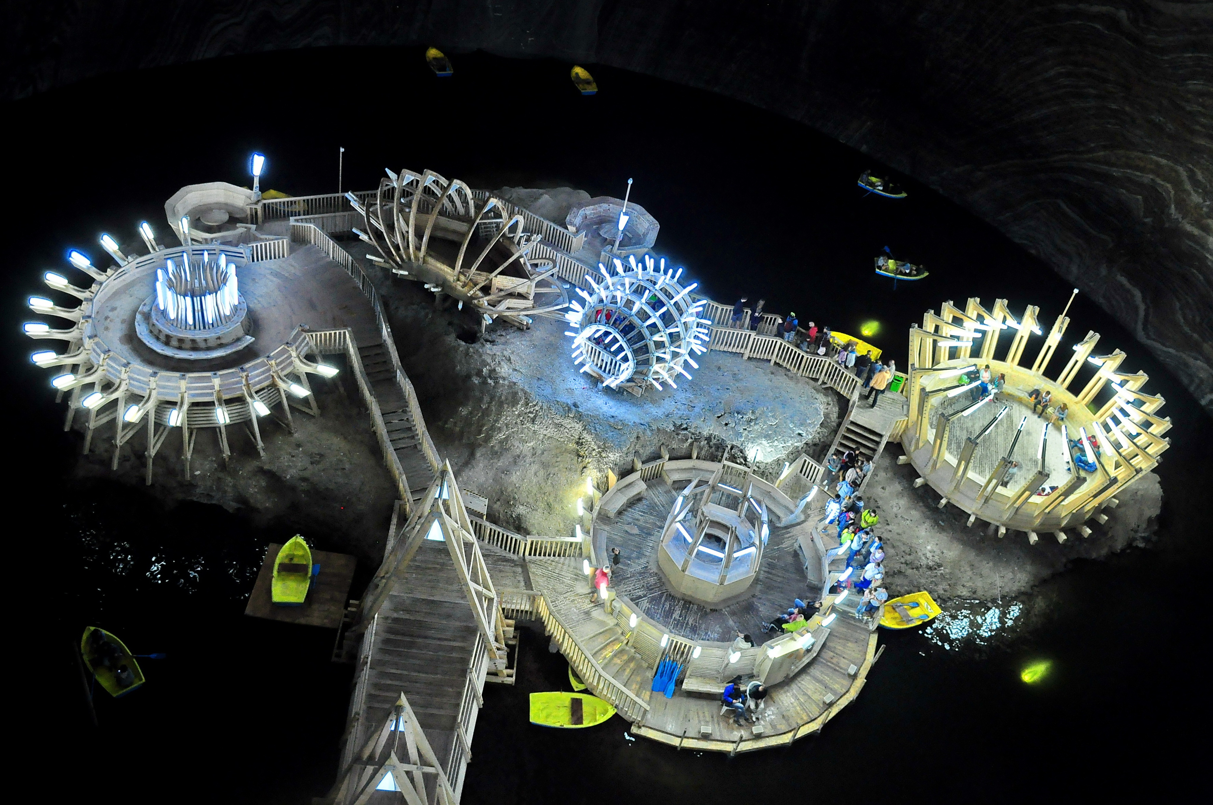 Salina Turda, Mina Terezia (fotografie realizata din balconul din Mina Rudolf)